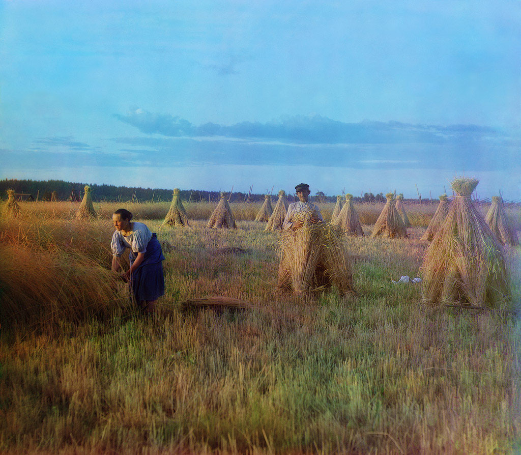 Прокудин-Горский. На жнитве. 1909